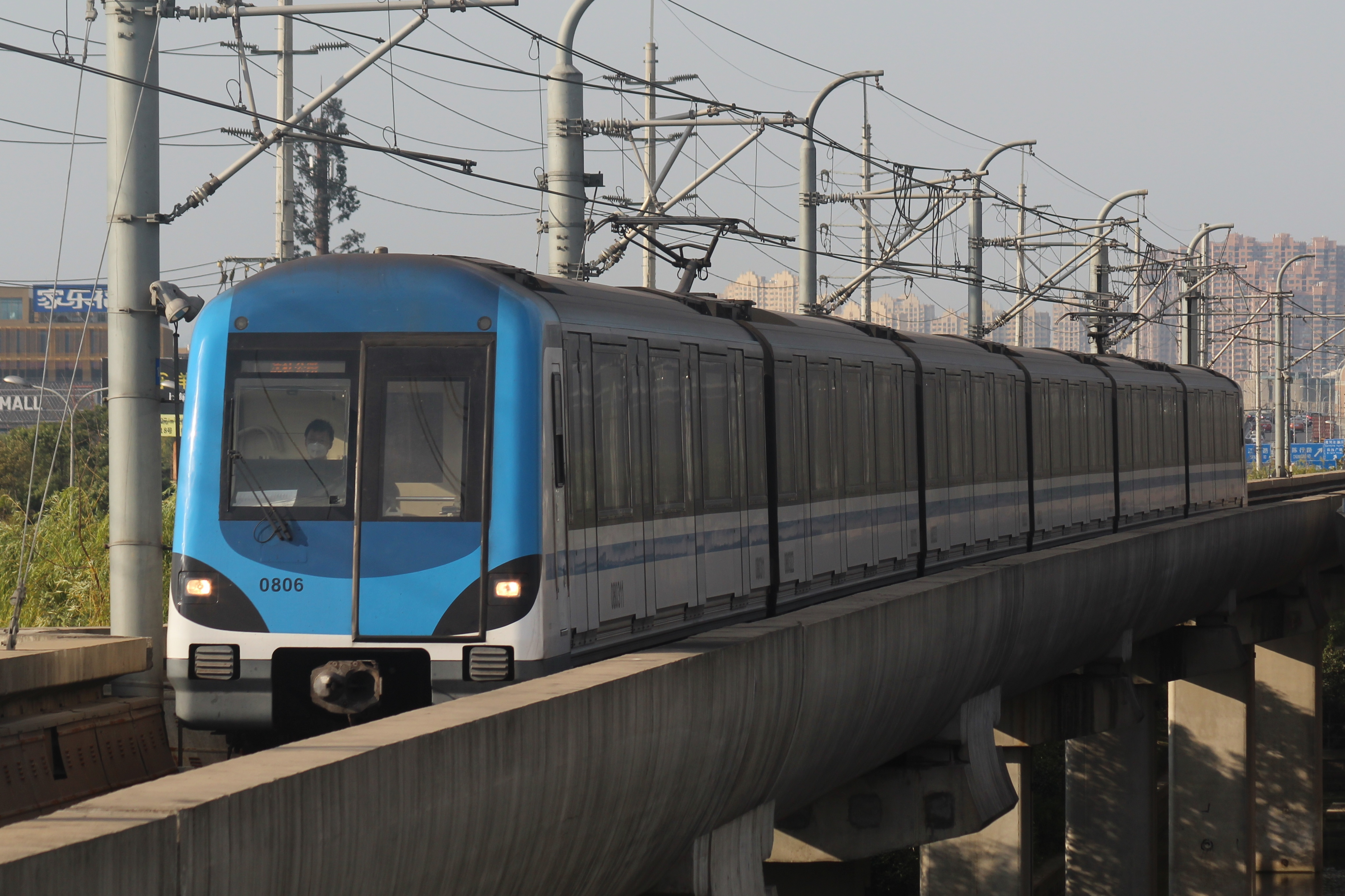 AC07型列車